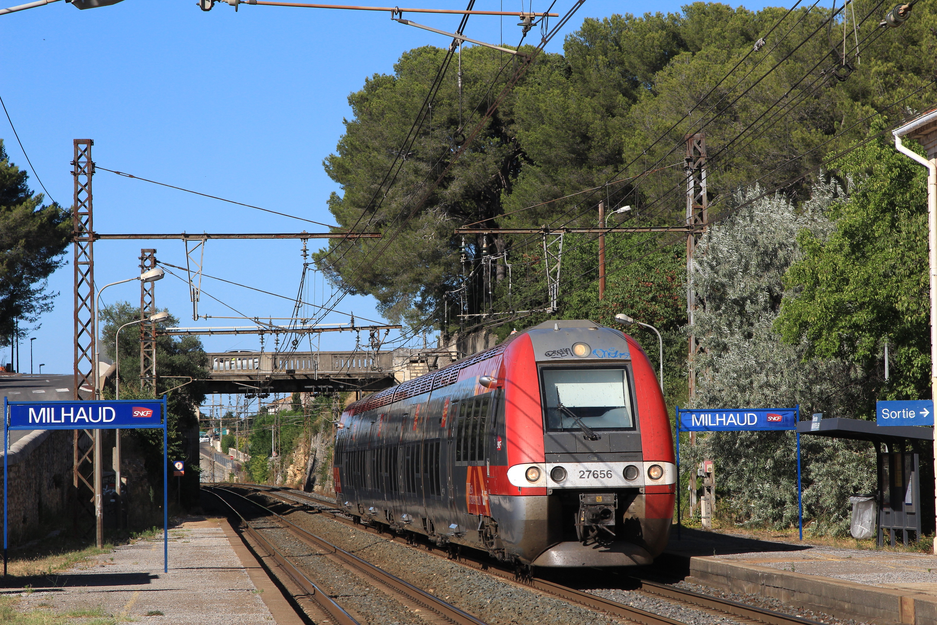 La Z 27656 assurant le TER 876311 Avignon - Montpellier) marque l'arrêt en gare de Milhaud.